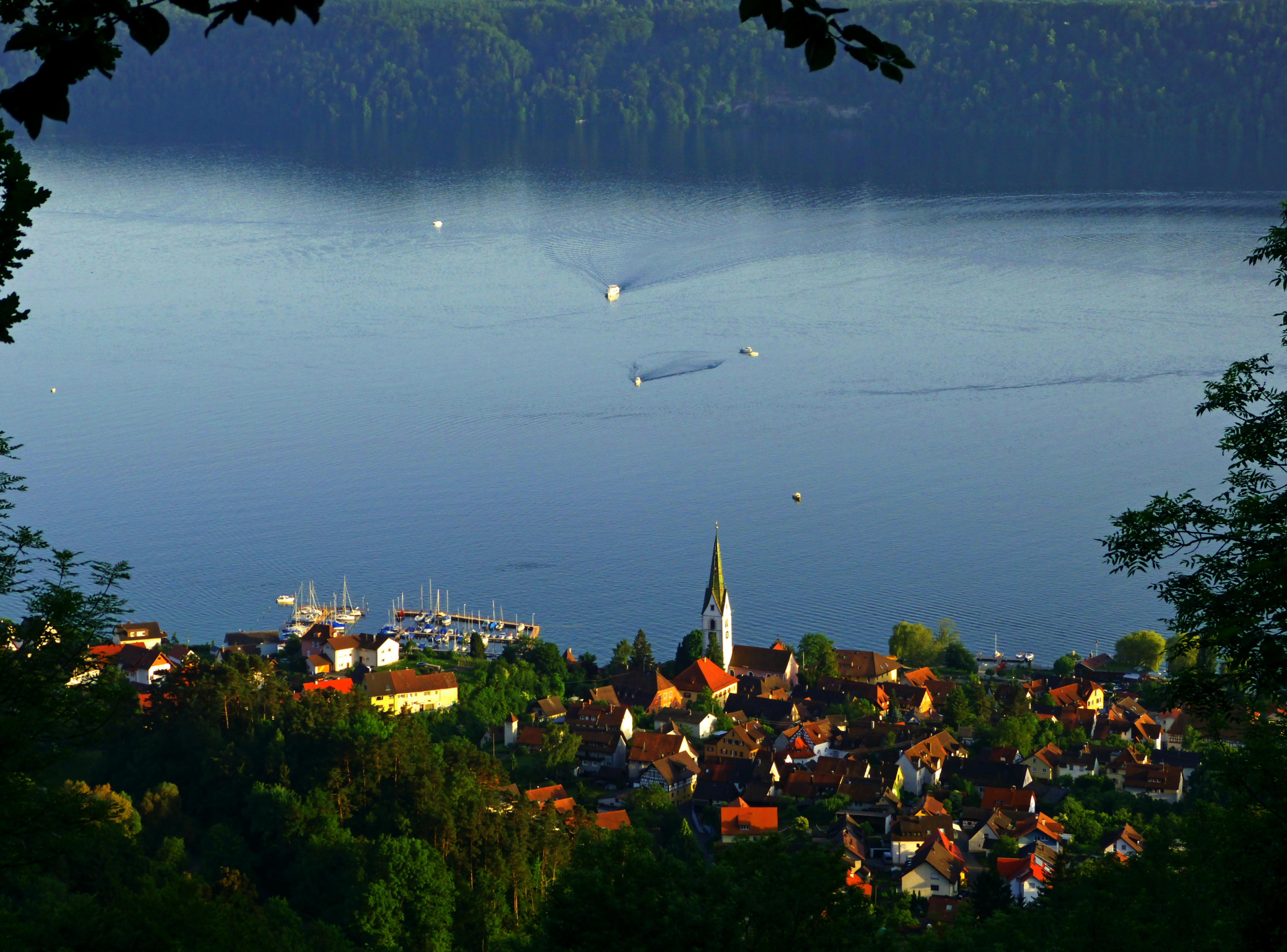 Sipplingen